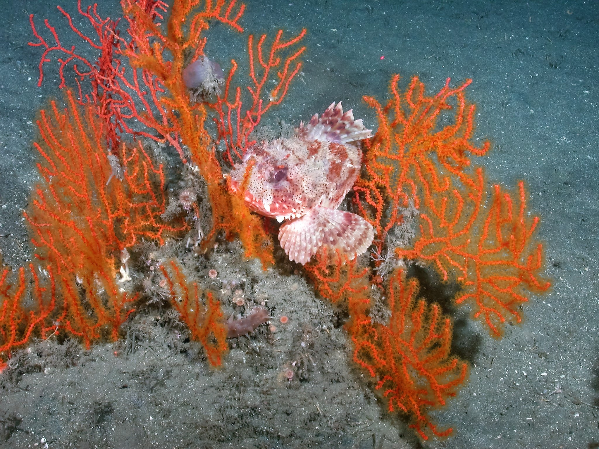 Scorpaena gutatta entre colonias de Adelogorgia phyllosclera, a 70 m de profundidad, Del Mar Steeples, California